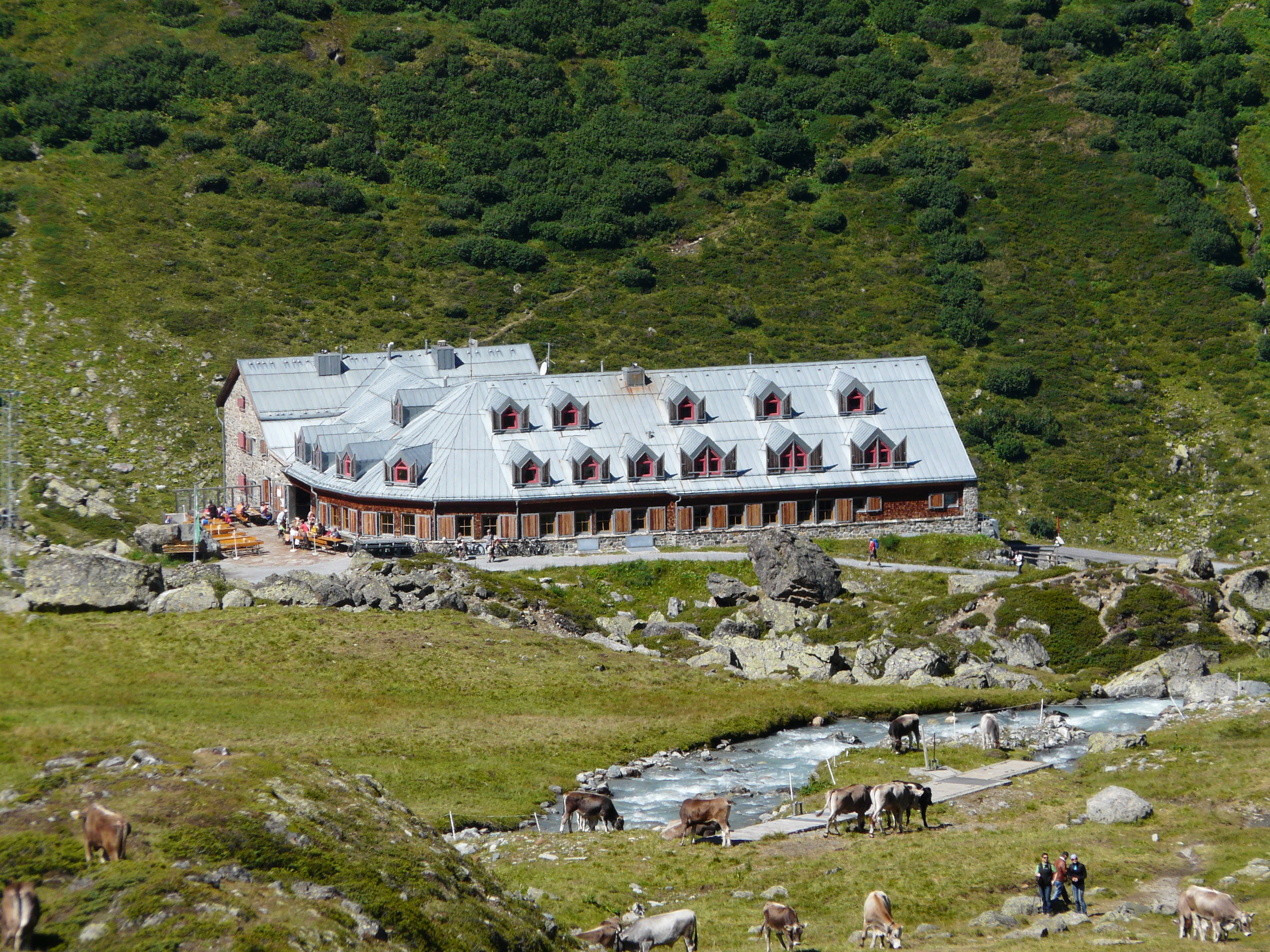 Jamtalhütte mit Futschölbach